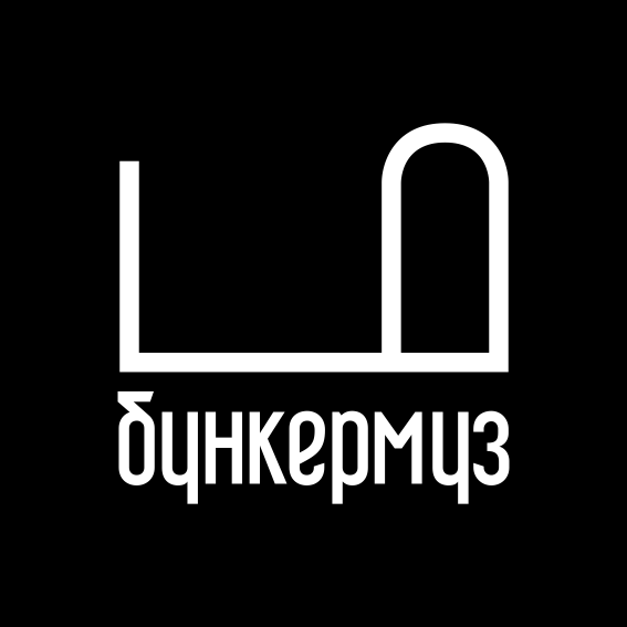 Логотип галереї Бункермуз та однойменного ресторану у Тернополі